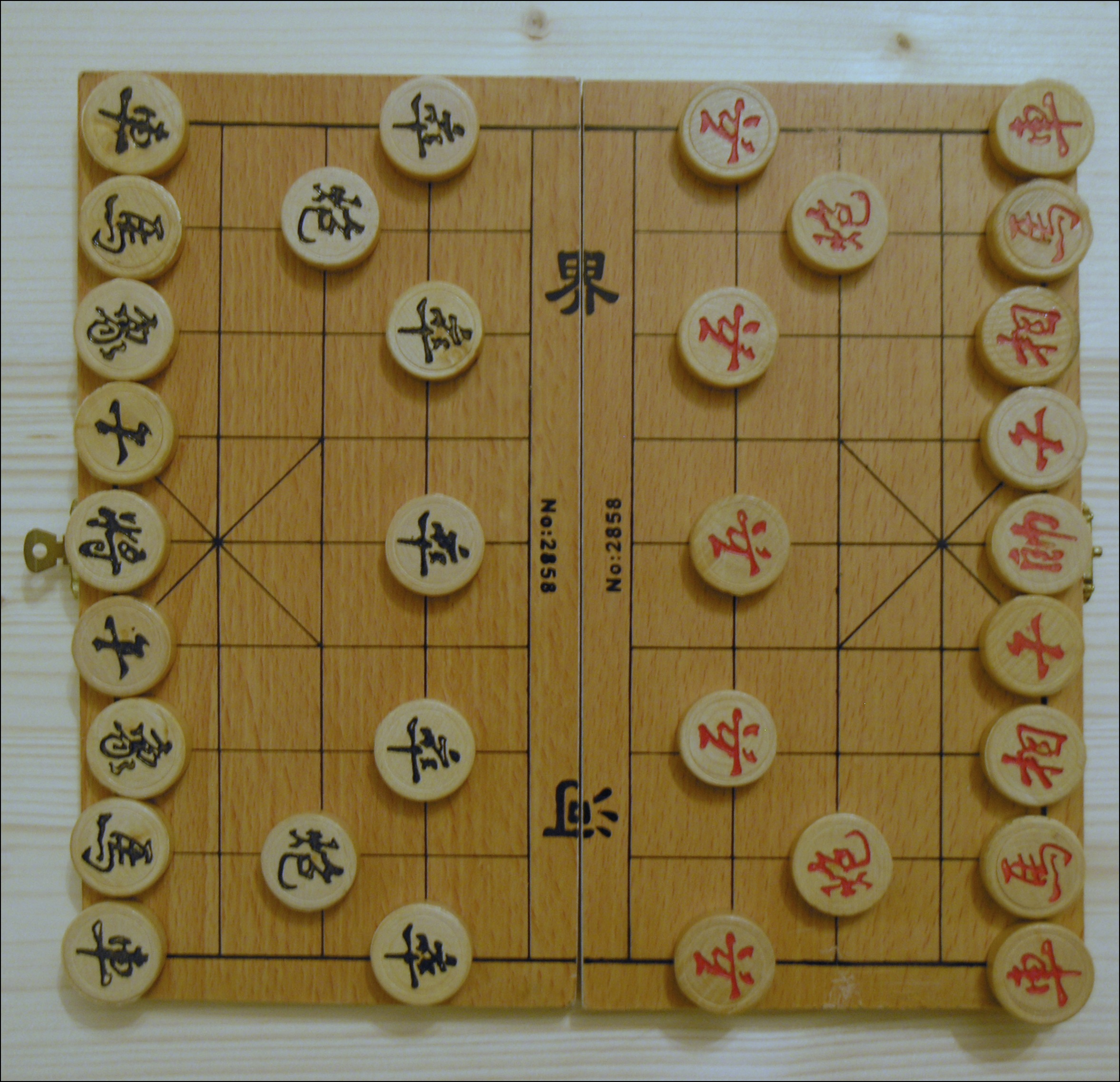 Siang-či - startovní pozice